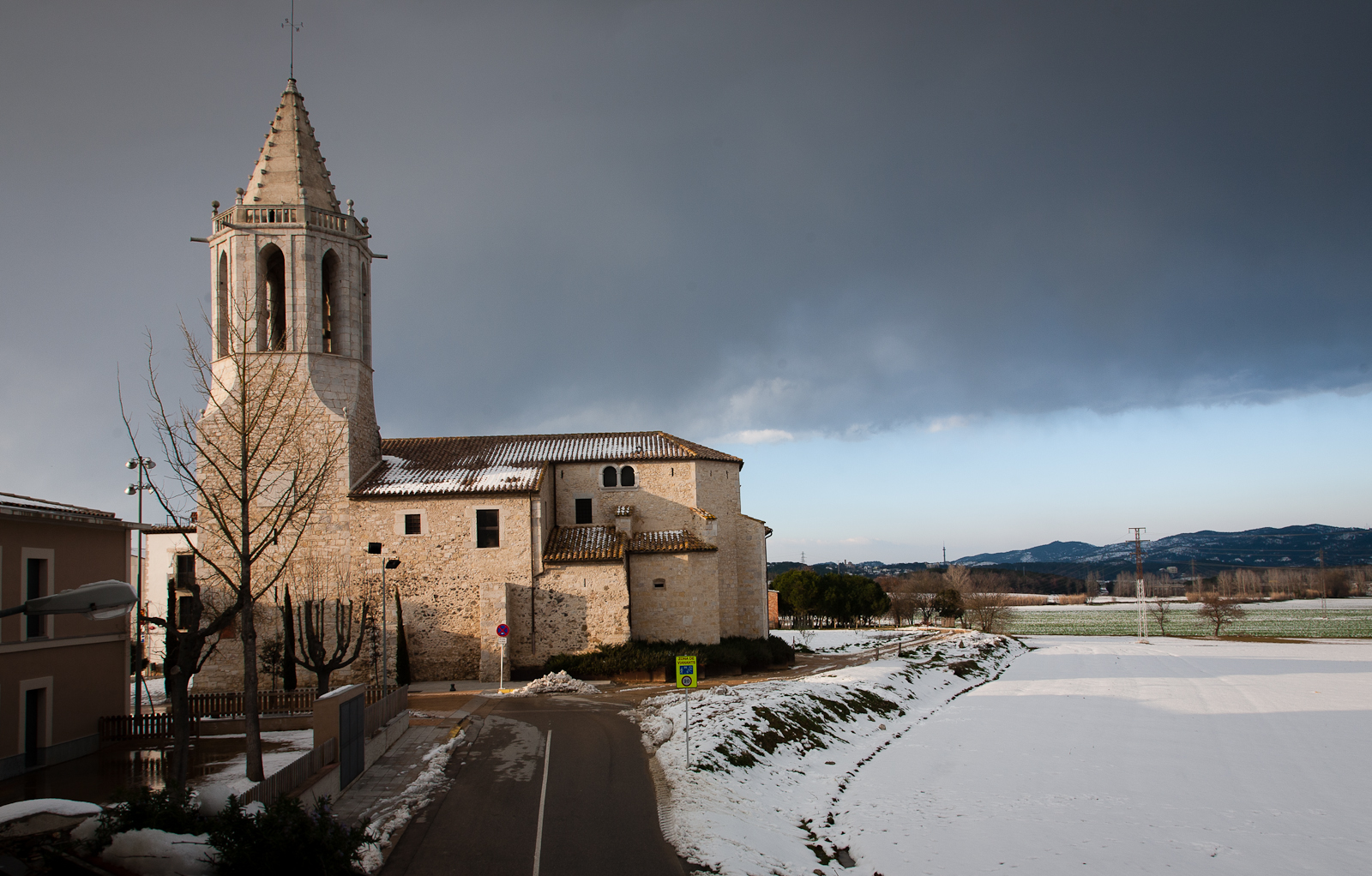 Església d'una sola nau amb elements poc remarcables a l'interior, però molt interessants a l'edifici exterior. Destaca per la seva dimensió el campanar, esvelta torre octogonal de carreu acabada amb una agulla i tenint la base de planta quadrangular; en una de les cares presenta un rellotge de sol. En la seva part oposada hi ha una torre de vigia -garita volada-. El frontis és la part més important a nivell artístic.